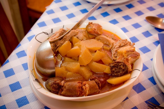 Pote de nabos